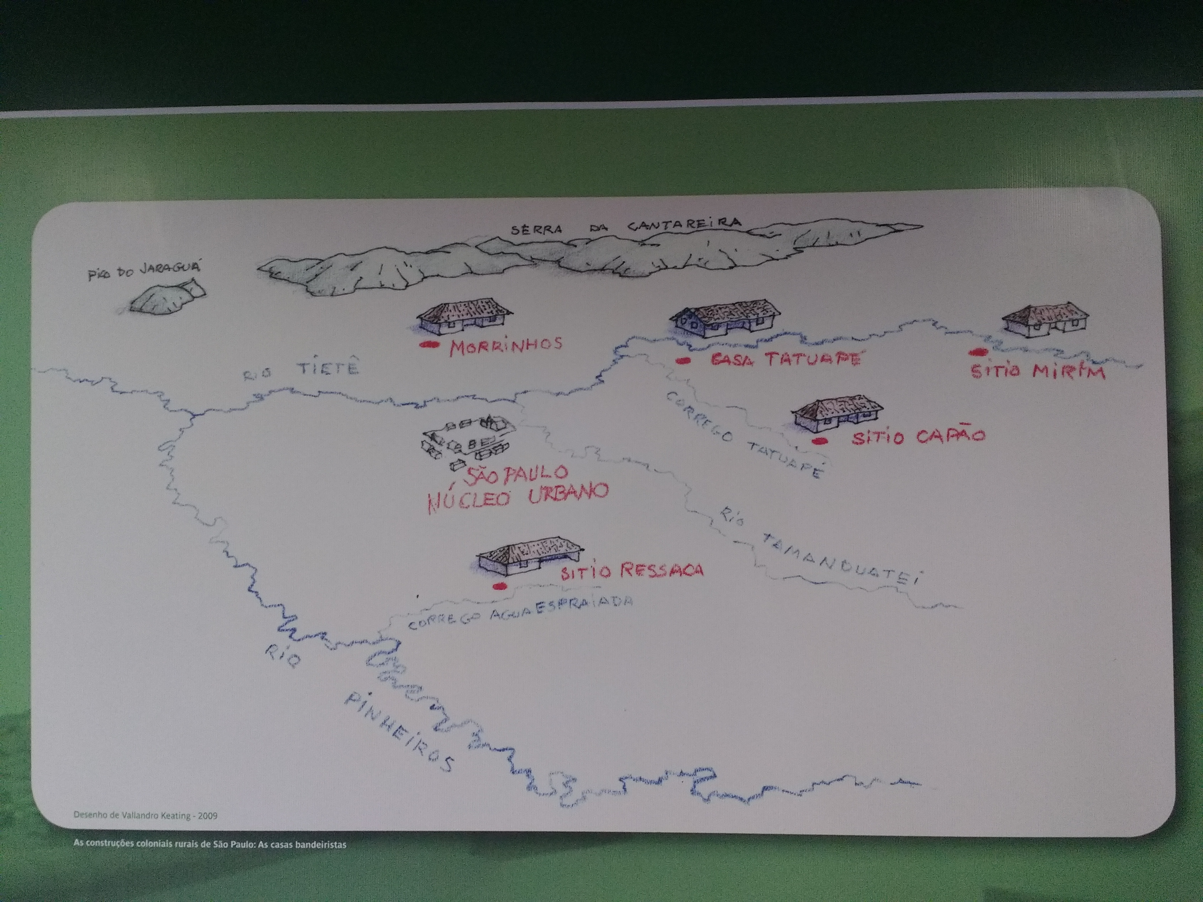 Desenho representativo das casas bandeiristas do periodo colonial, das quais o Sitio Morrinhos faz parte.